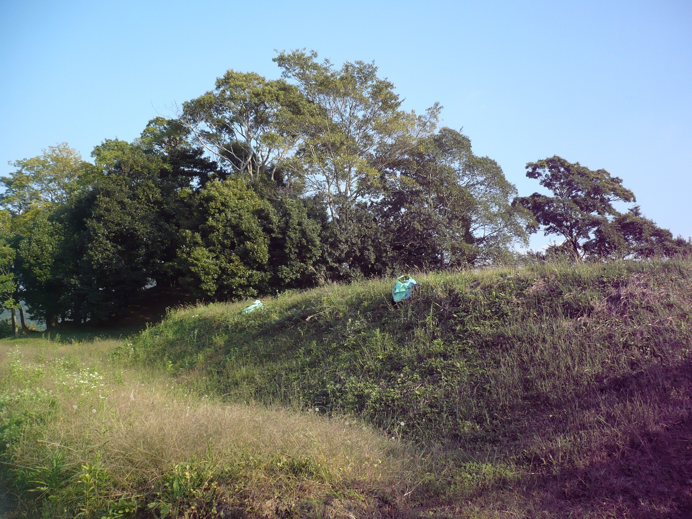 馬越長火塚古墳（まごしながひづかこふん、愛知県指定史跡）